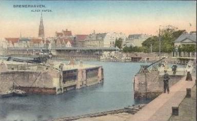 Alten Zufahrt zum Alten Hafen in Bremerhaven. Die Schleuse wurde 1830 eröffnet und 1933 zugeschüttet. Im Hintergrund links die Große Kirche, rechts das Hansestadt Bremische Amt